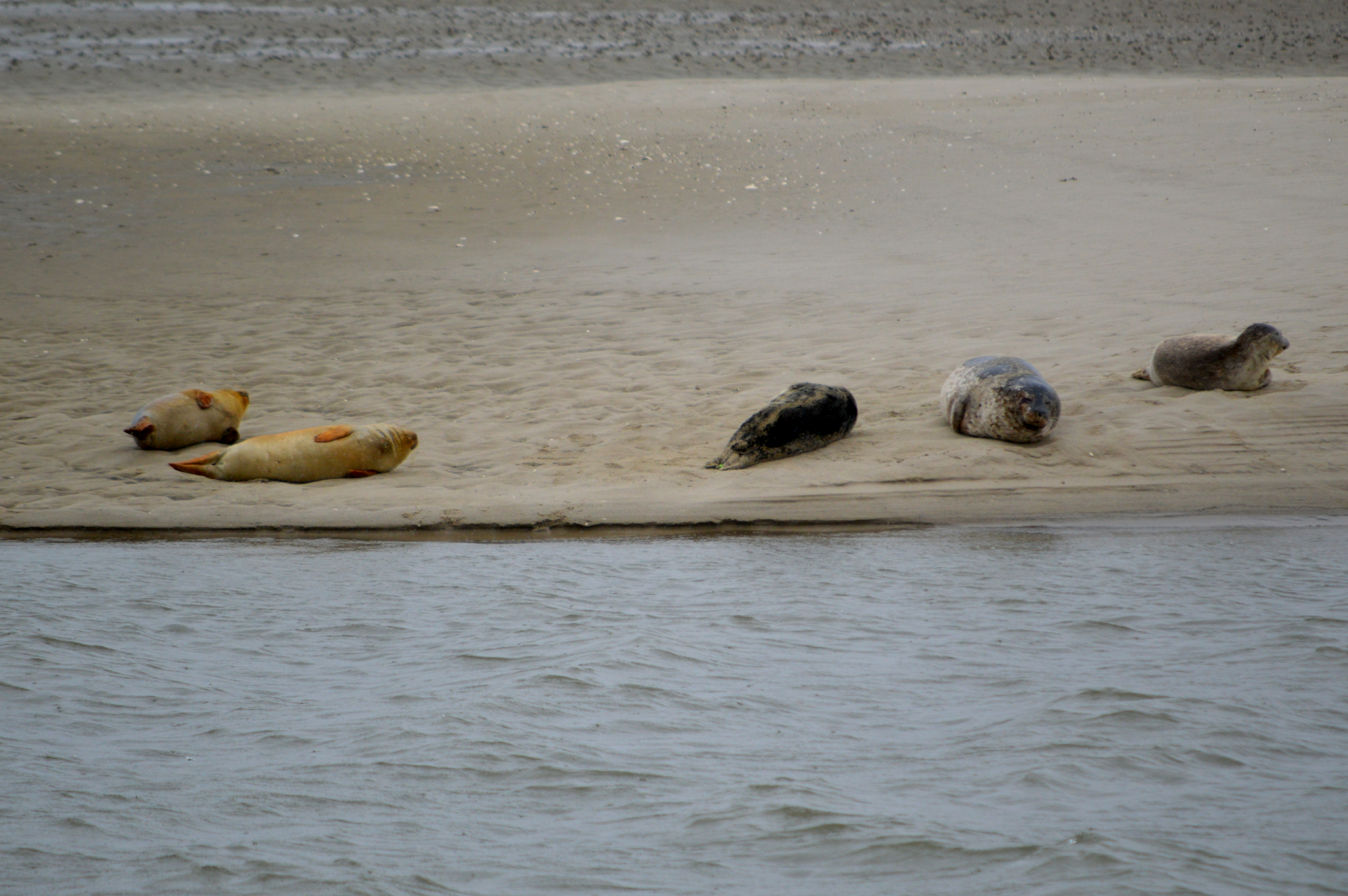 Fanø - Seehunde